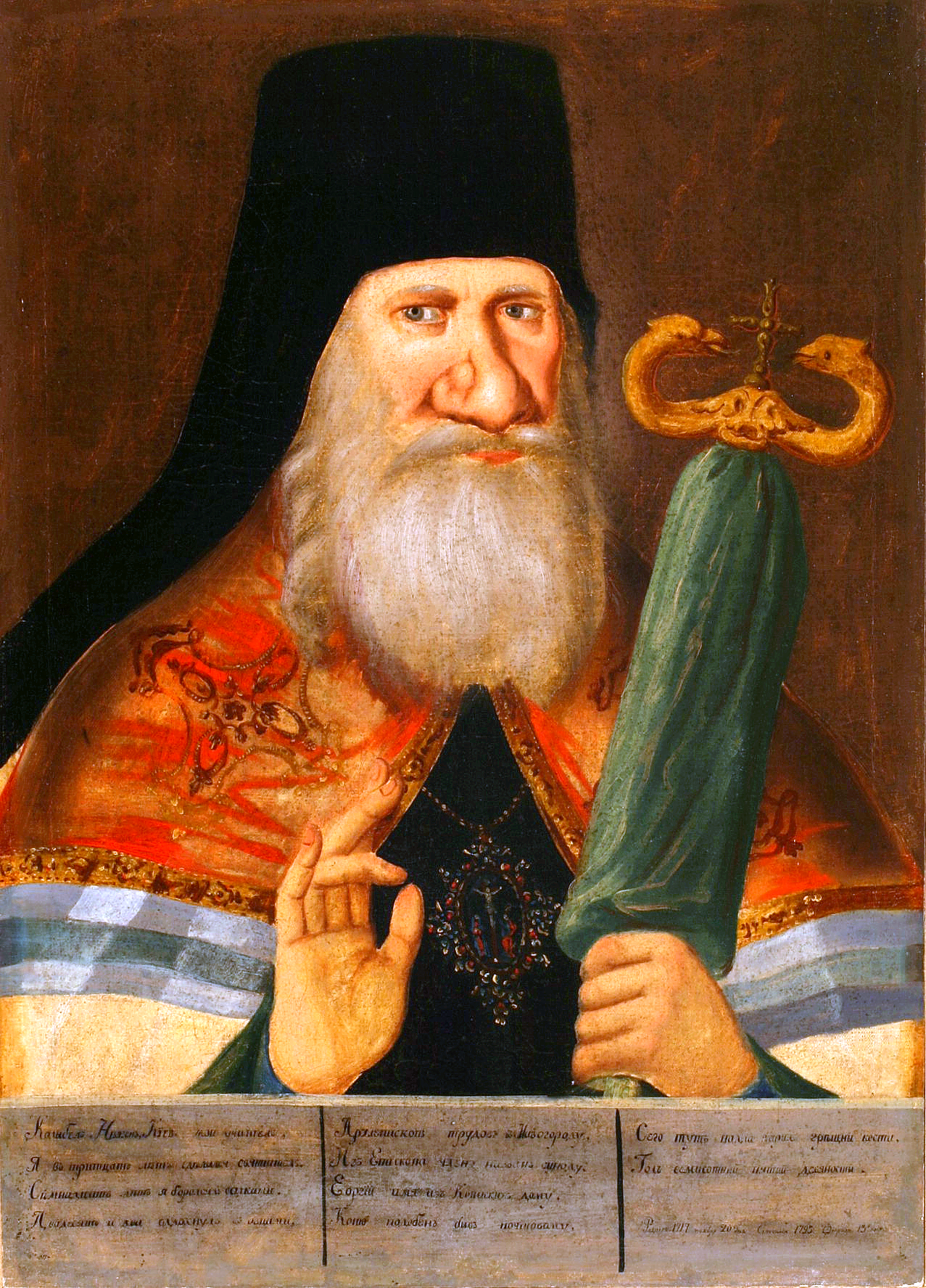 Georgij Konisski